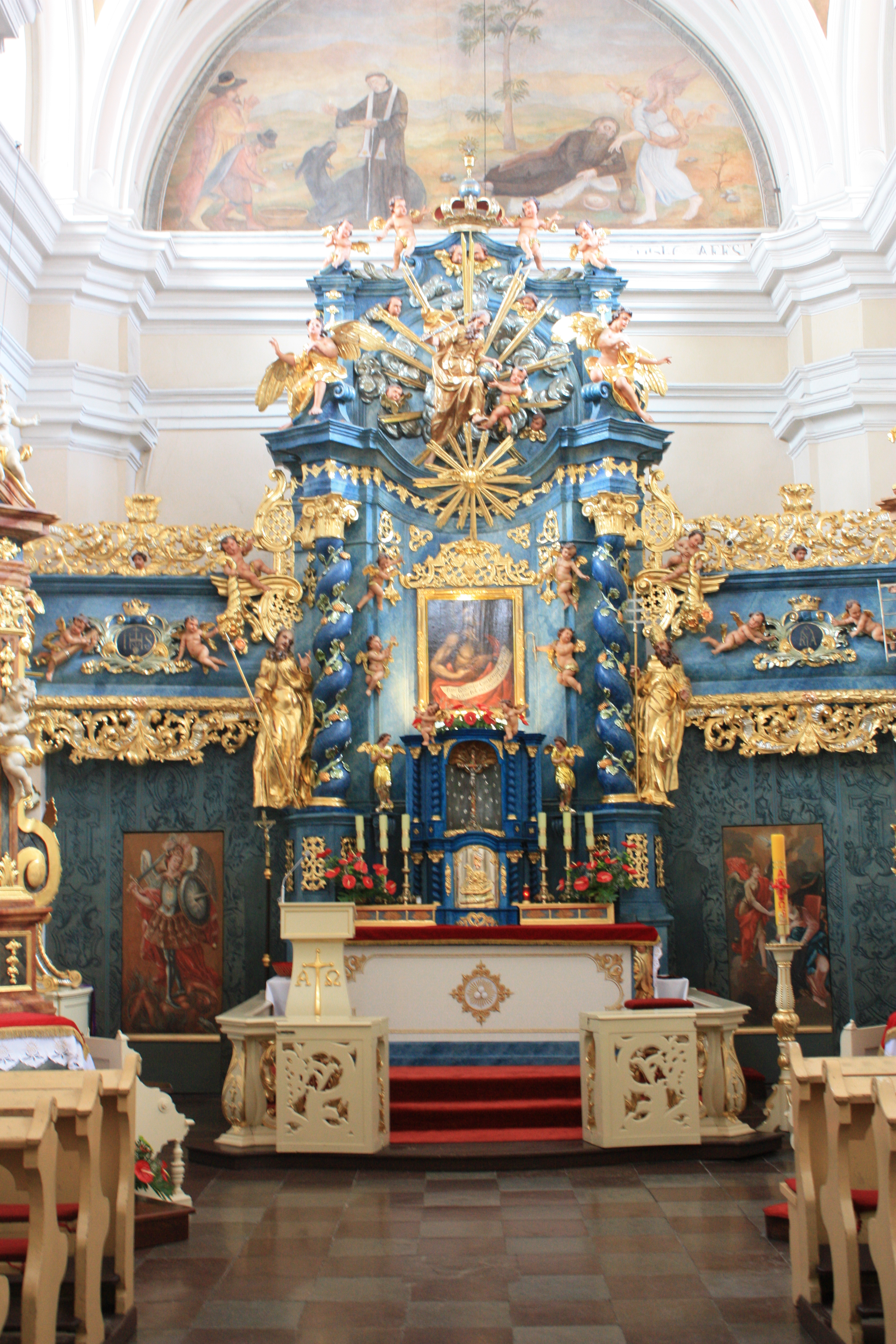 Kościół Najświętszej Krwi Pana Jezusa w Poznaniu. Ołtarz główny.